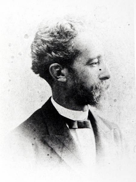 Quintino Boaciuva. /quintino_bocayuva.jpg